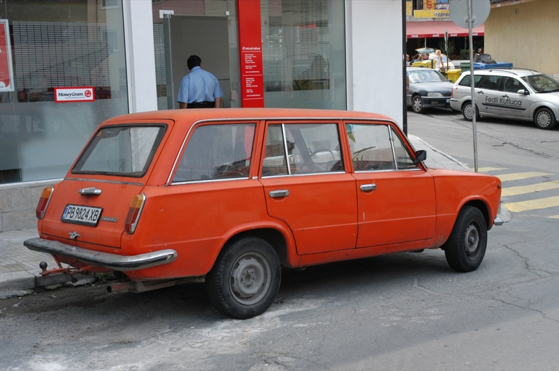 Lada 2102 in Sozopol, Burgas, Bulgaria.